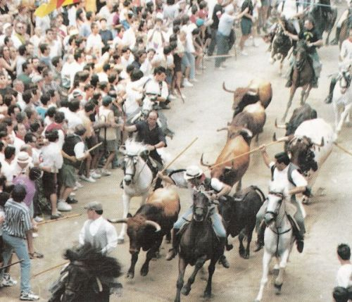 Foto de la entrada de toros de Segorbe, tomada en el año 1998